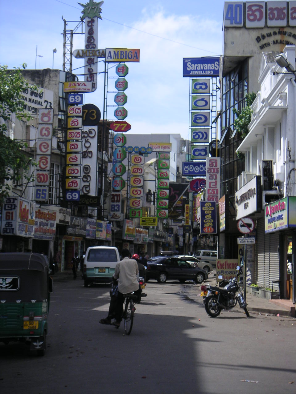 Colombo, Sri Lanka. Photo: Soman